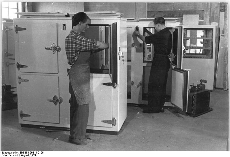 Zentralbild-Schmitd TBD 15.8.1953 Vorbereitungen zur Leipziger Messe 1953 Der VEB-Kältetechnik, Erfurt, stellt in Leipzig einen Kühlschrank aus, der gleichzeitig als Schauvitrine benutzt werden kann. UBz.: Kollege Heinz Richter baut die Roste ein und Josef Weiss (hinten) montiert die Rohrleitung.